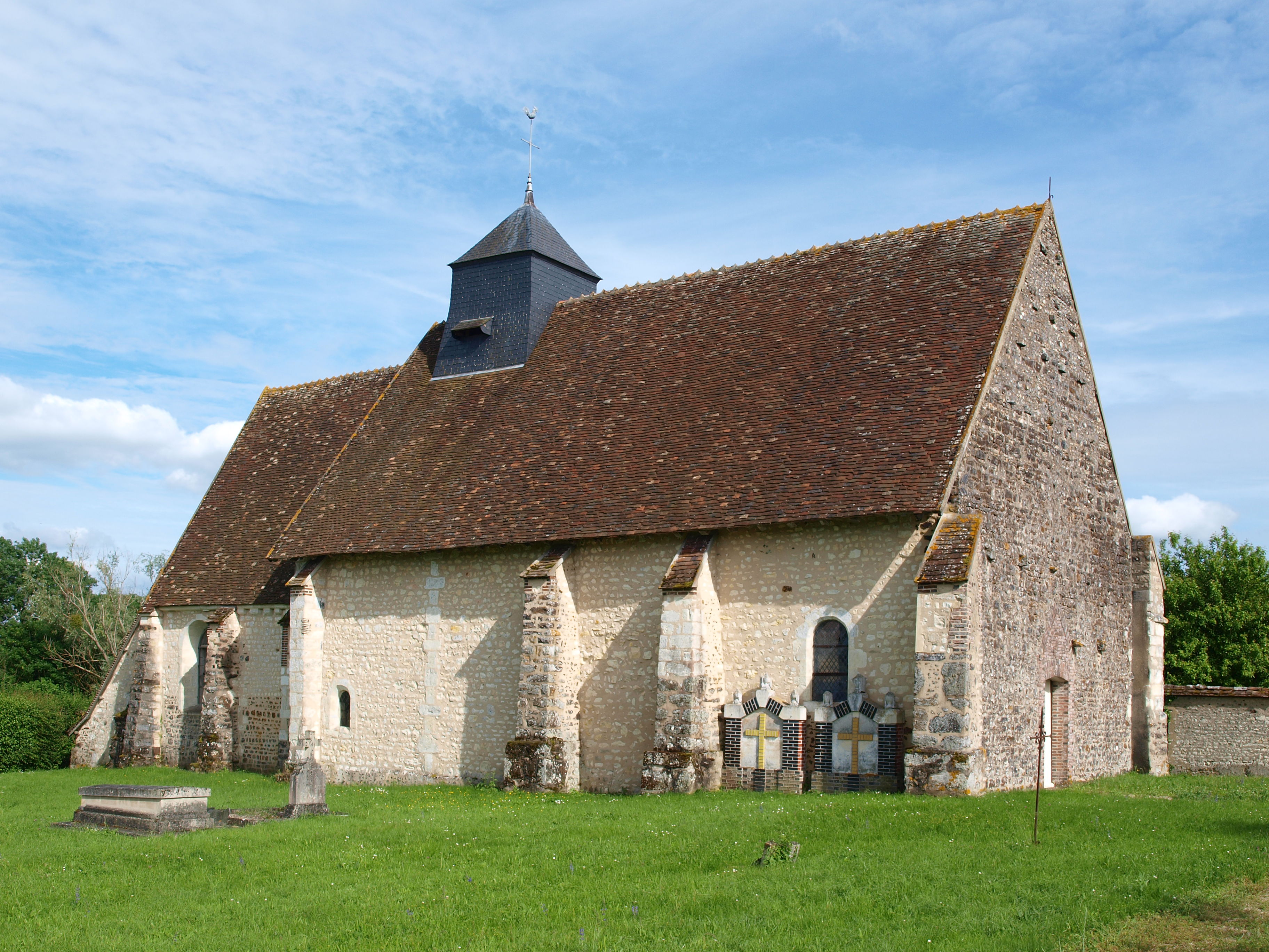 Saint-Martin-sur-Ocre (Yonne, France) ; Saint-Martin sensus stricto.